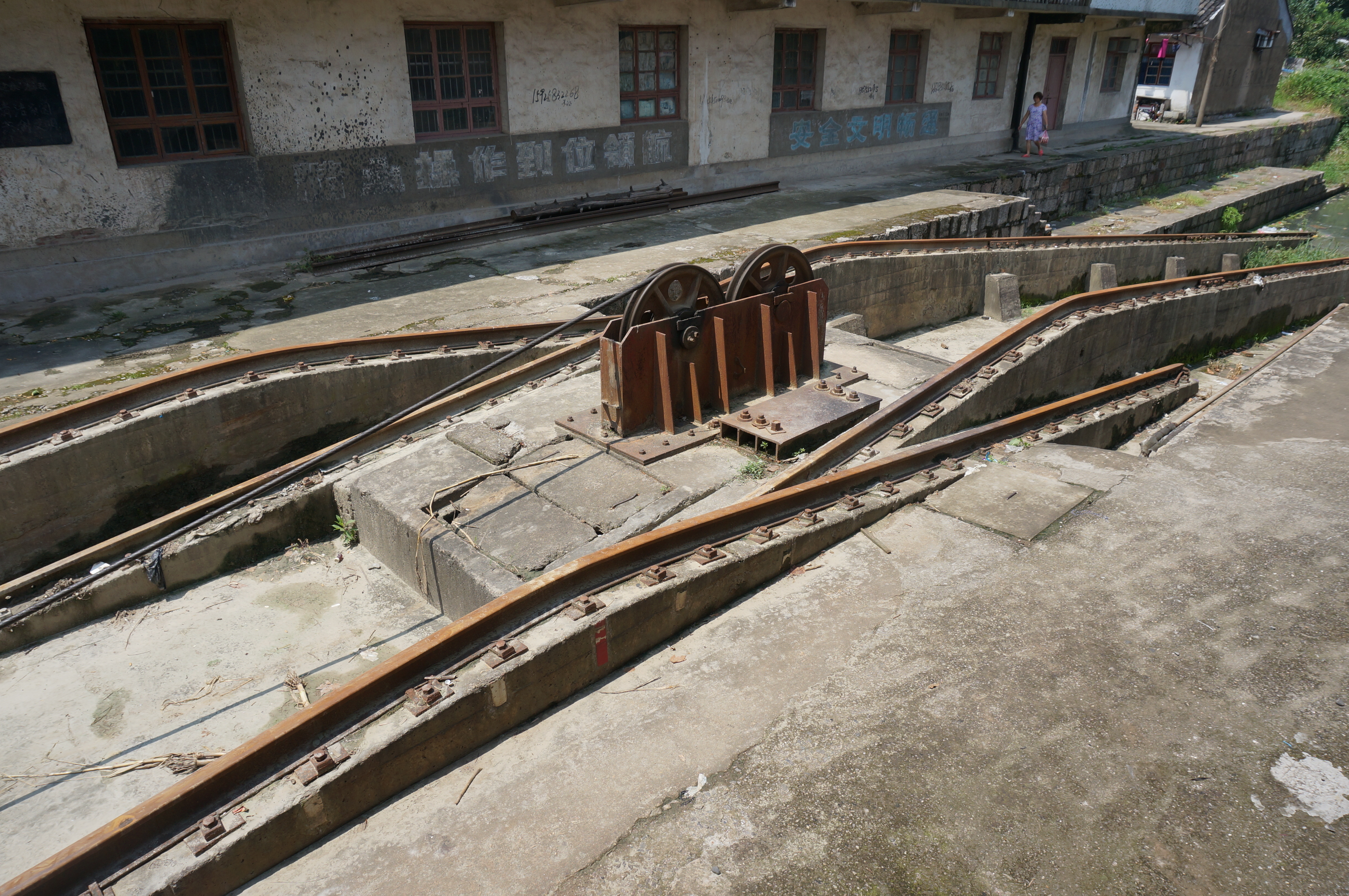 曹娥江运口水利航运及服务设施——上虞老坝底堰坝，斜面高低轮升船机闸中部。